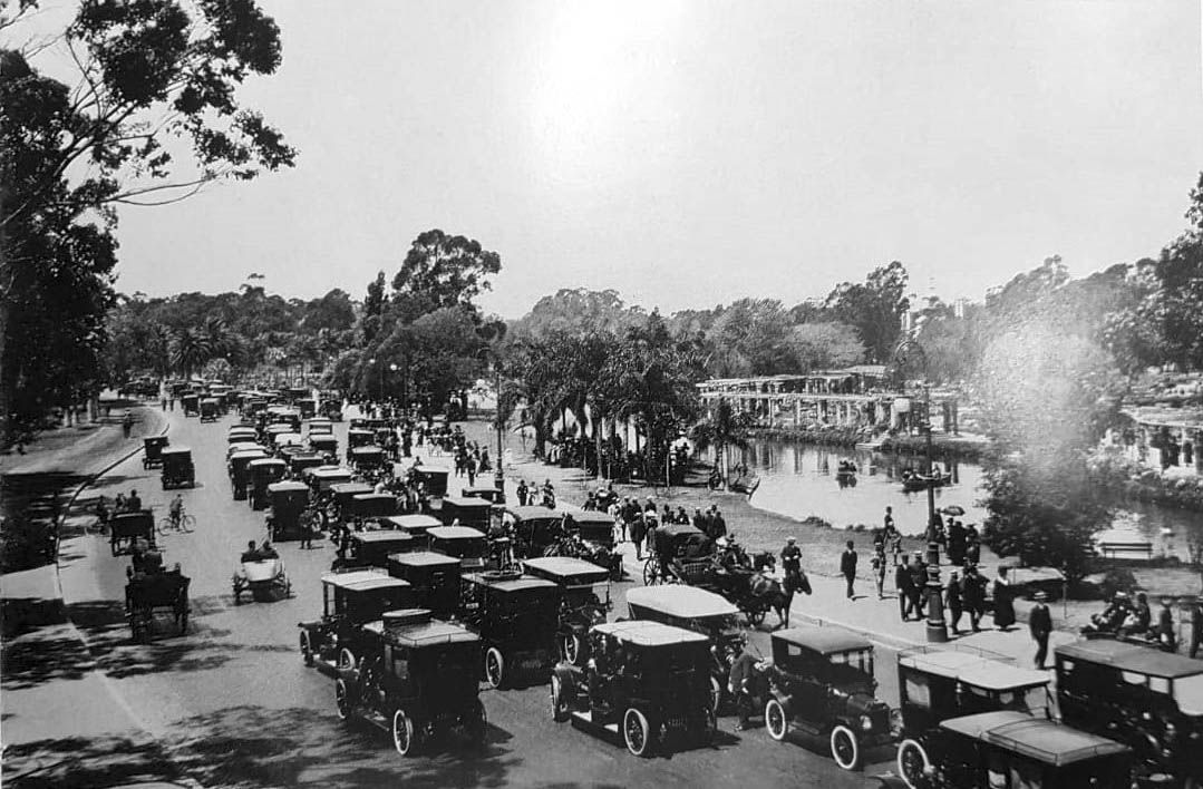 aqui podemos ver una fotografia de como era la safueras del hipodromo de palermo en la decada del 90